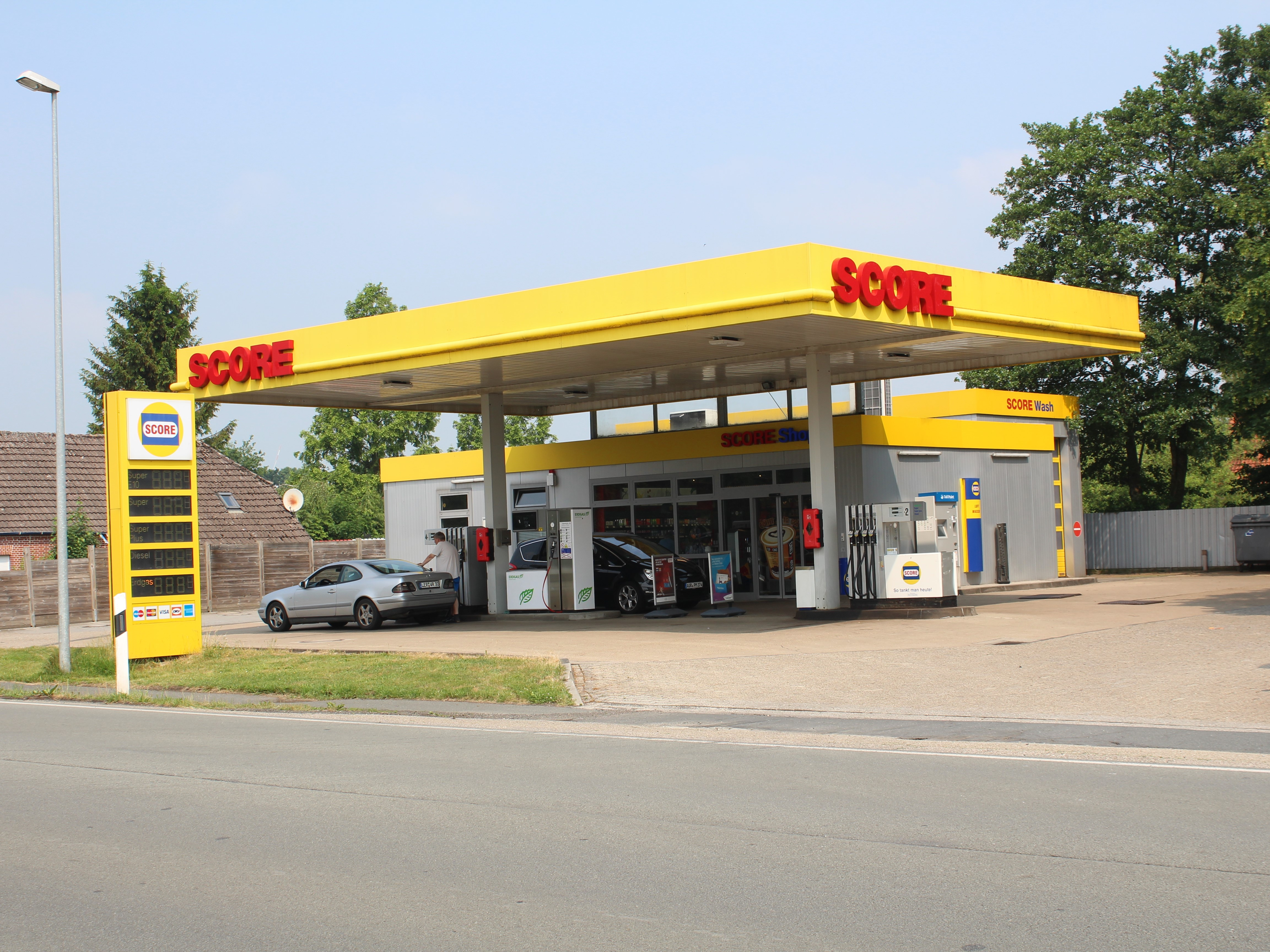 Score-Tankstelle in Möhlenwarf, Weener, Ostfriesland, Niedersachsen, Deutschland